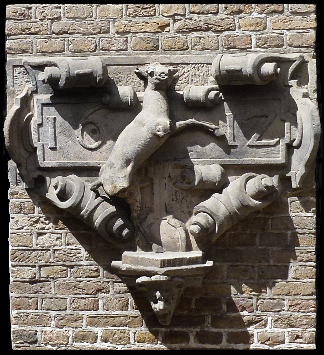 Gevelsteen 't Herthuys, Museum Gouda